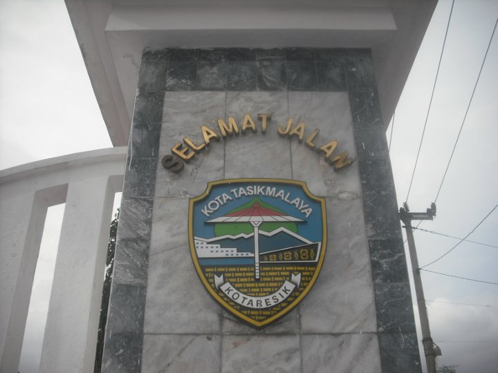 Template:Lambang kota tasikmalaya yang berada di monumen perbatasan